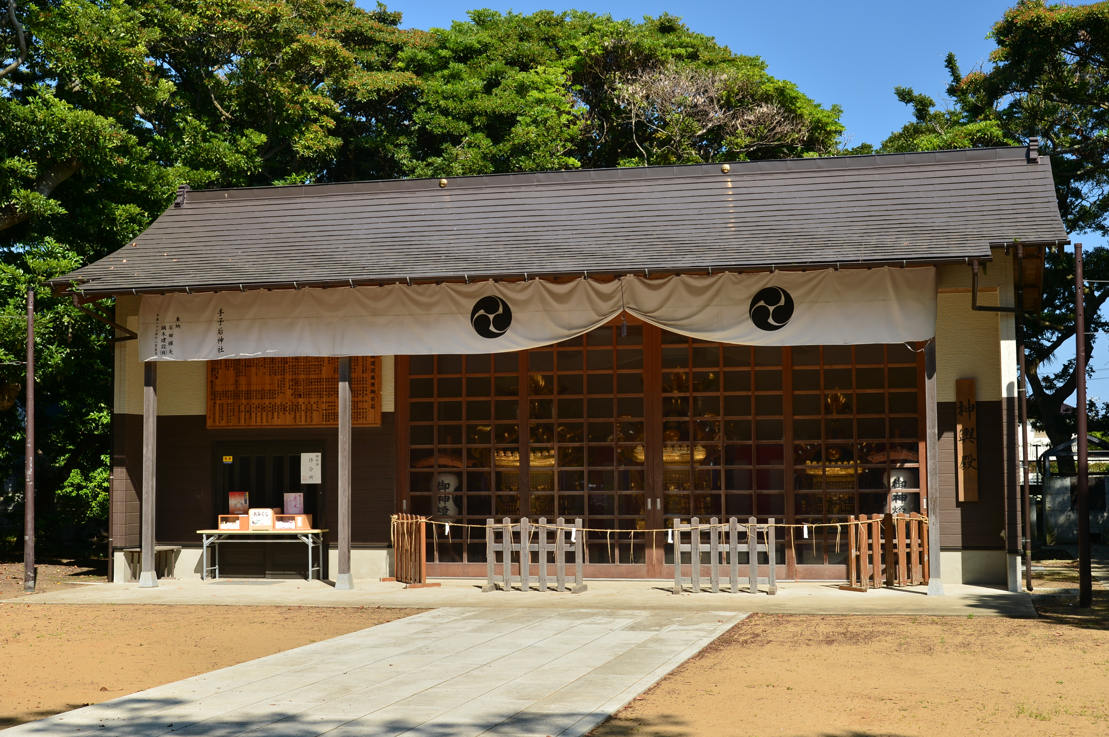 手子后神社の神輿殿（茨城県神栖市）